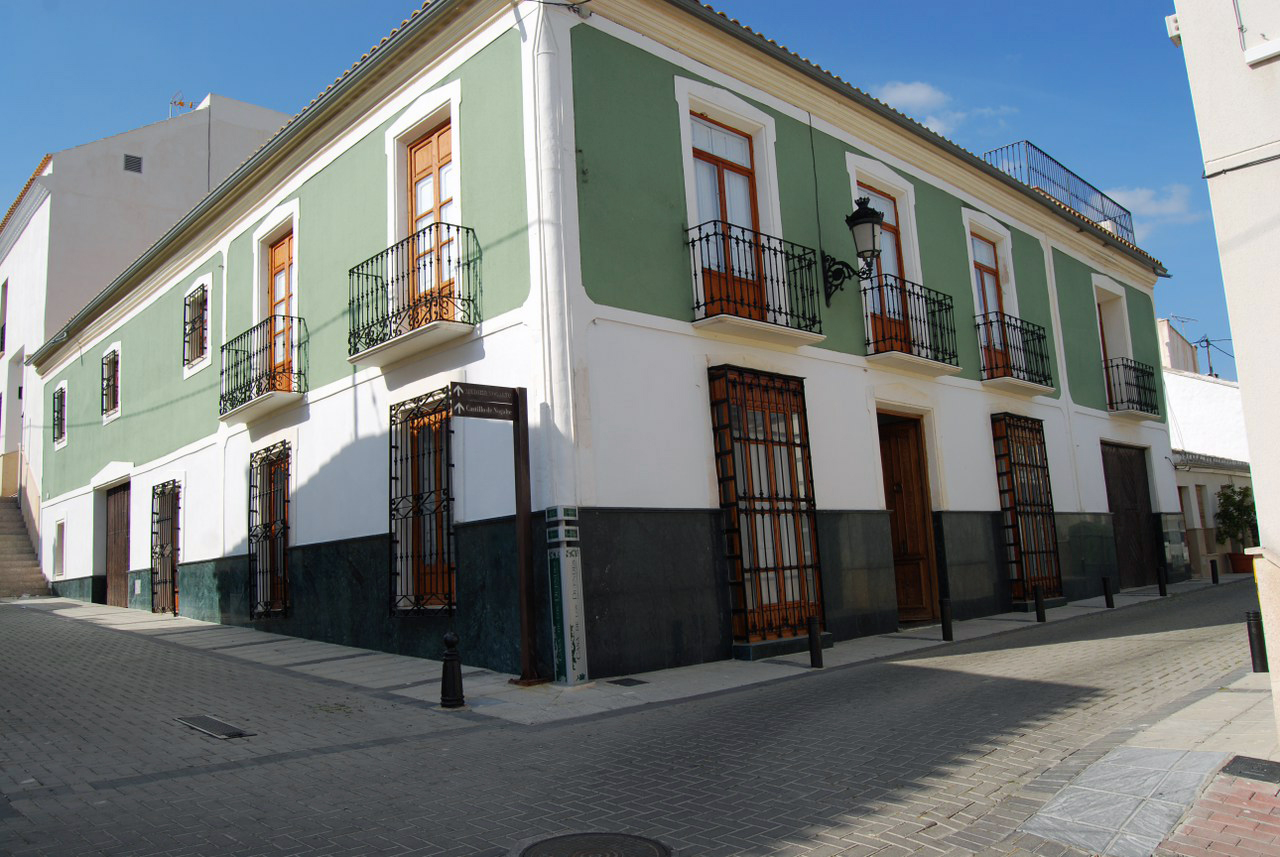 Vista general del edificio por la tarde